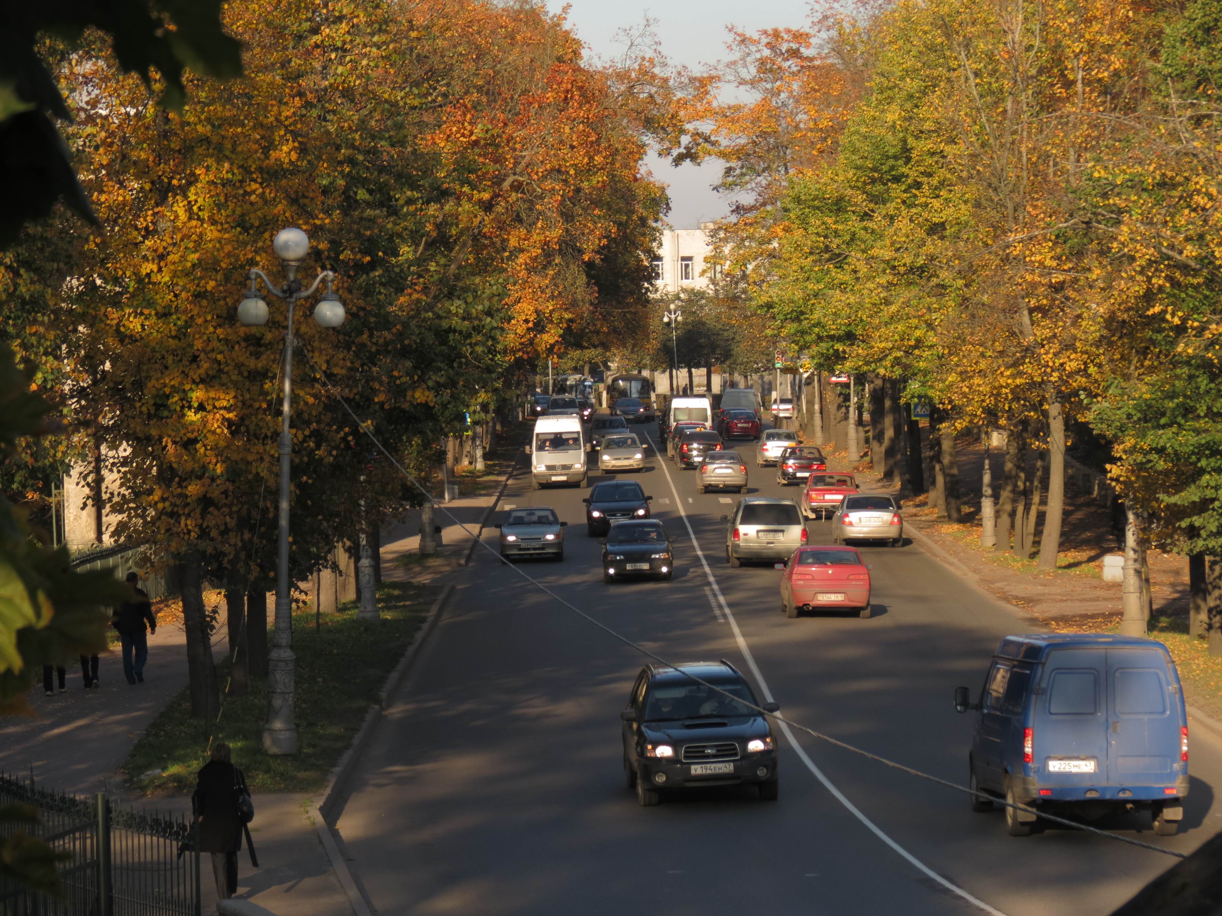 Вид на пр. 25 Октября с Балкона-террасы у Карпина пруда. Гатчина, Россия